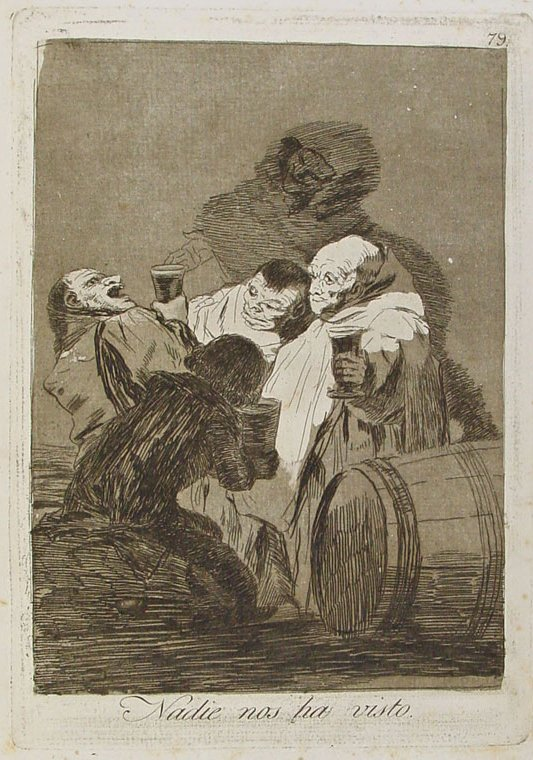 Capricho nº 79: Nadie nos ha visto de Goya, serie Los Caprichos